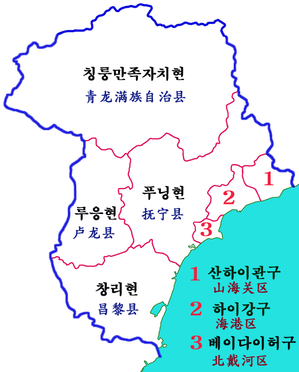 허베이성 친황다오현급구역